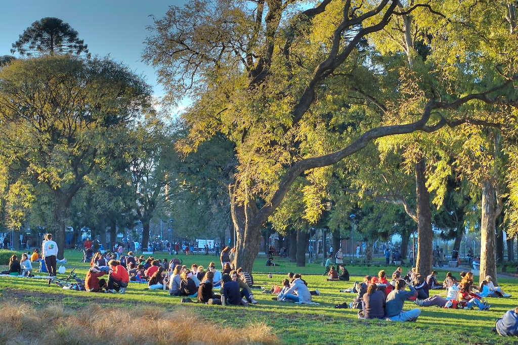 Sunday visitors at Parque Centenario, Buenos Aires.